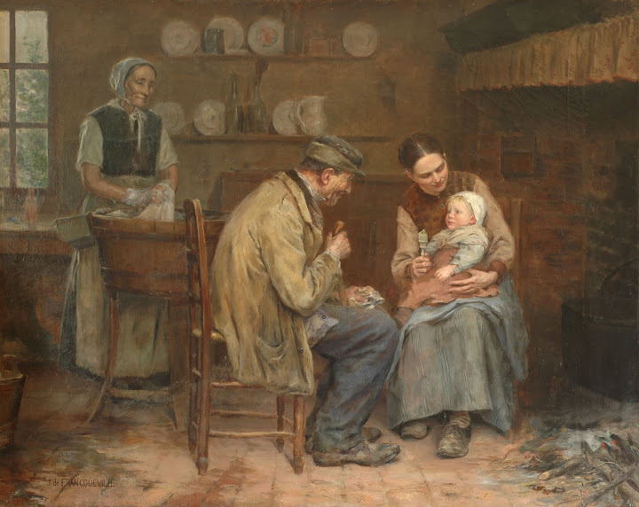 Peinture à l'huile de Jean de FRANCQUEVILLE